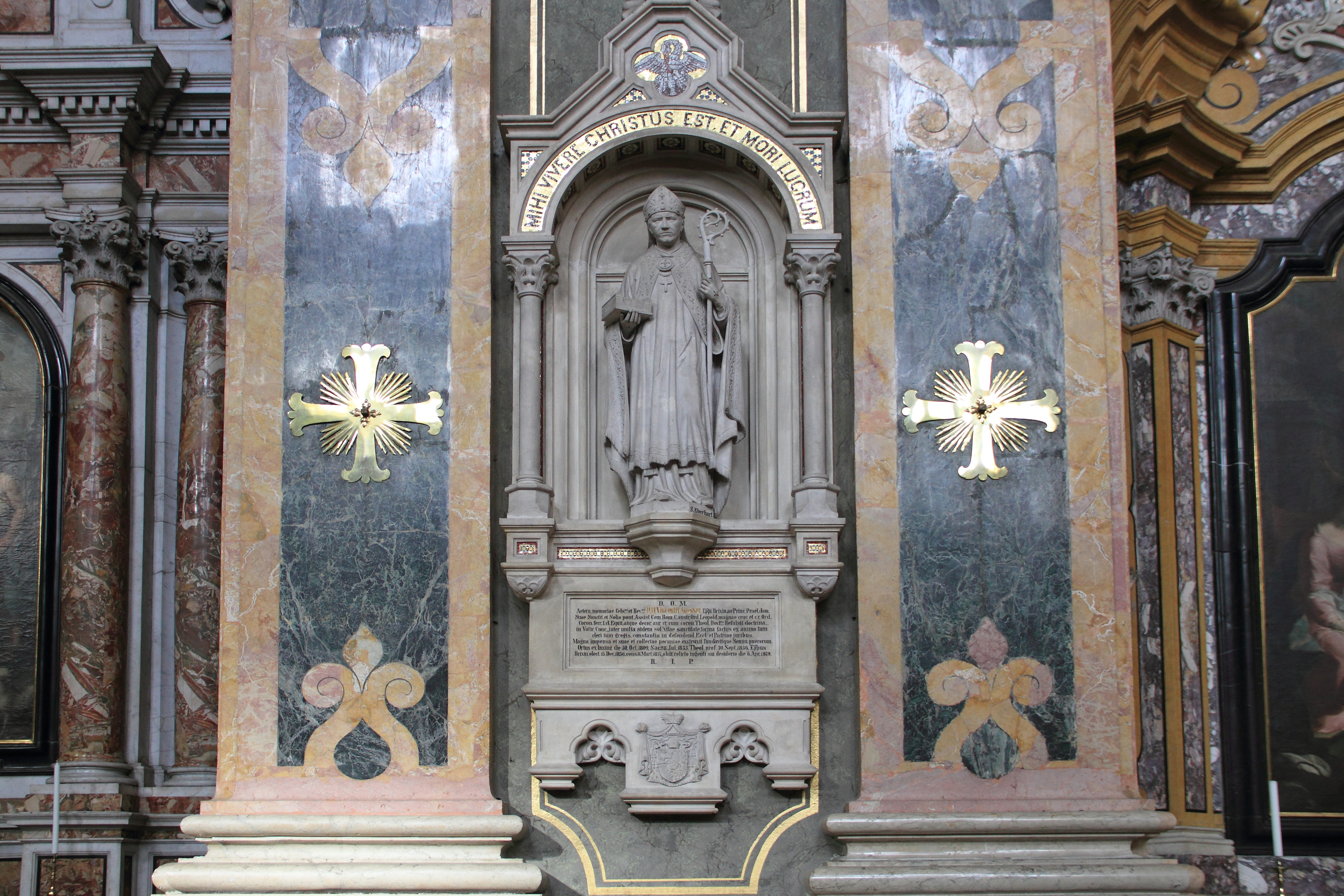 Statue S. Eberhart im Brixner Dom.